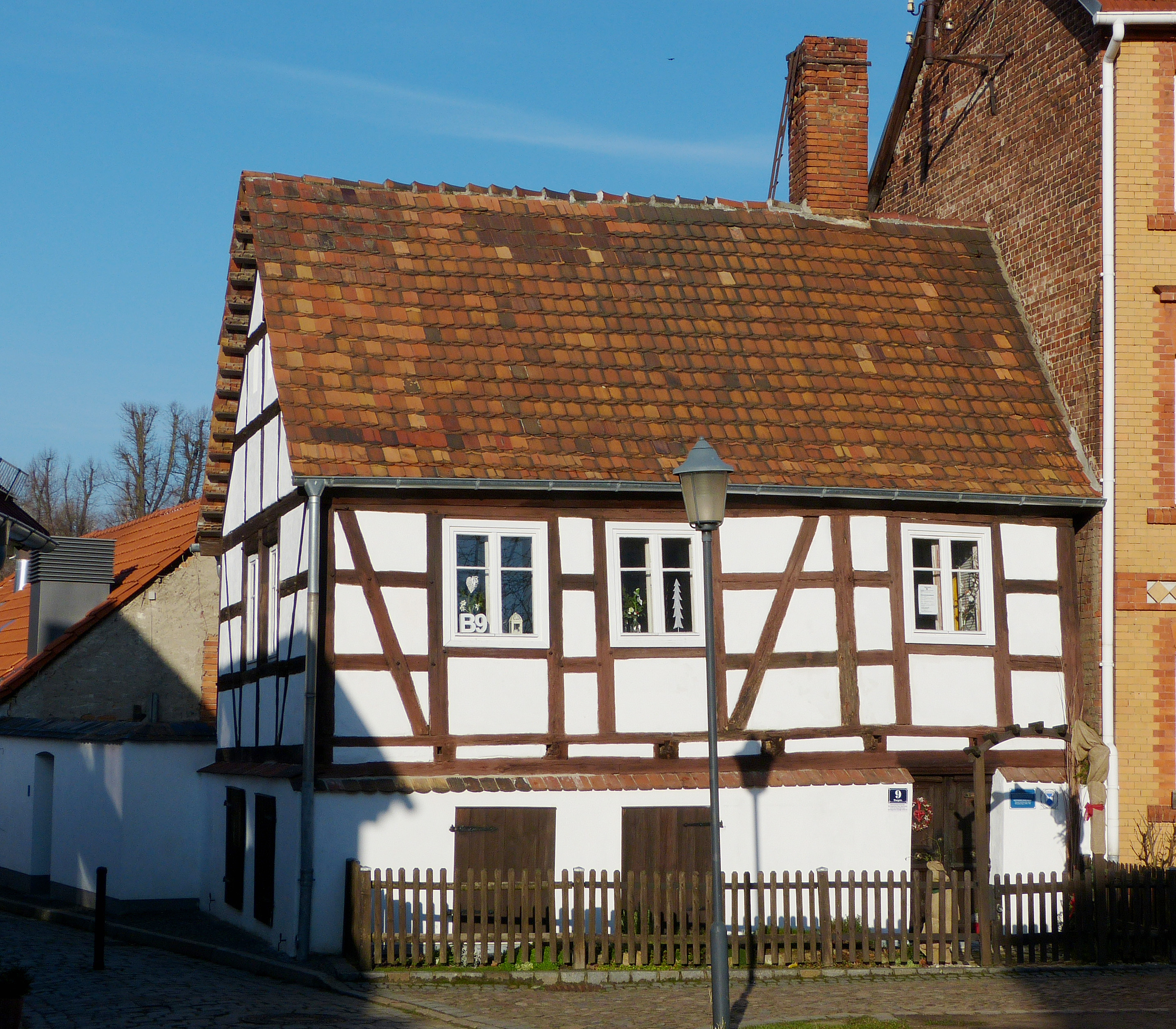 Ältestes Haus der Stadt Spremberg. Sonntagsches Haus (nach letzter Bewohnerin). Sanierungsbezeichnung B9 (für Burgstraße 9)